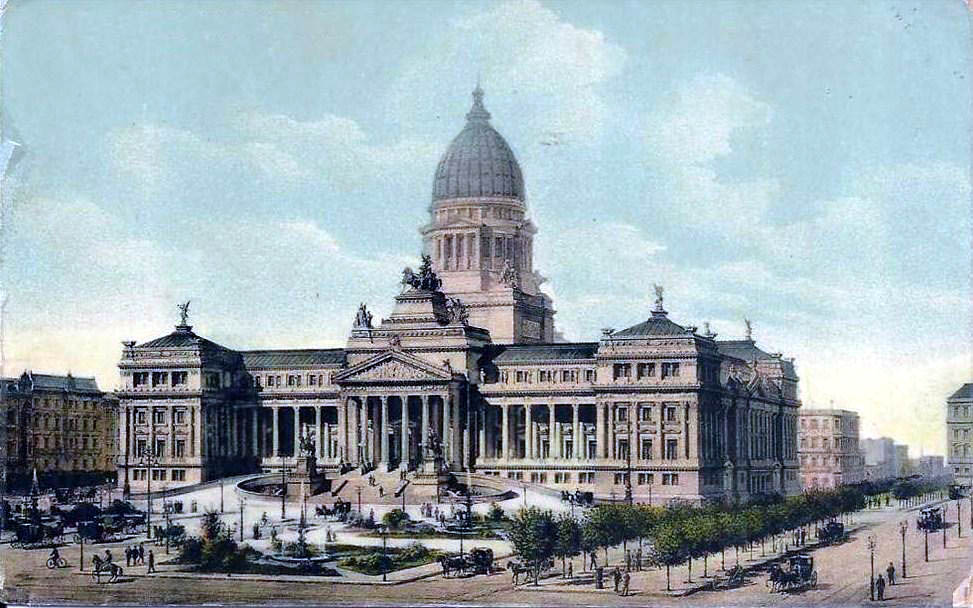 Pintura del arquitecto Vittorio Meano con el proyecto para el Palacio del Congreso Nacional de la Argentina, presentada al concurso realizado en 1896.